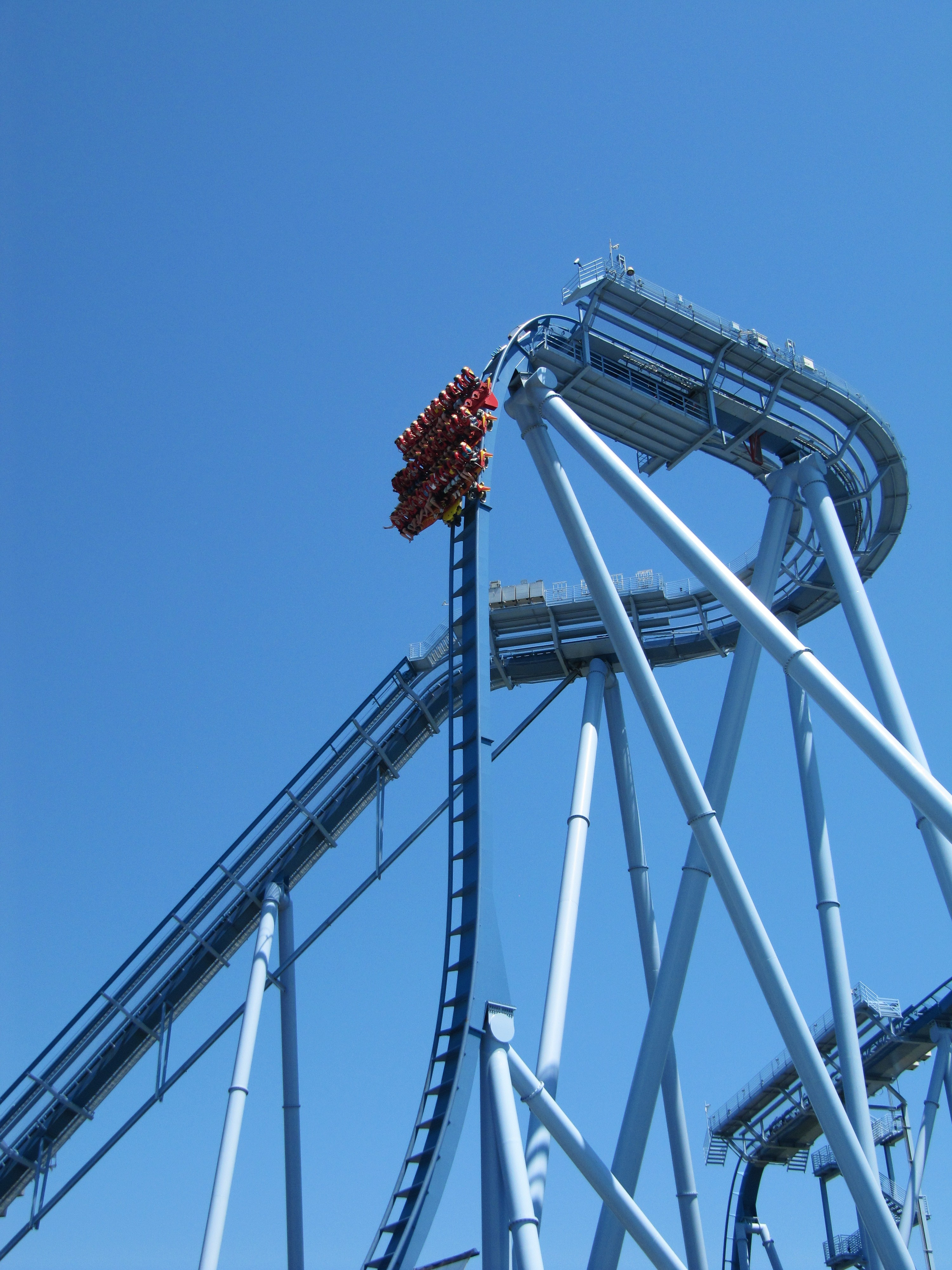 Der First Drop der Achterbahn Griffon in Busch Gardens Williamsburg